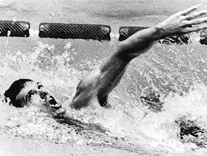 Juegos Panamericanos